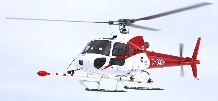 Helicoptère modifié et équipé du stinger de Novatem (STC Novatem Inc.)